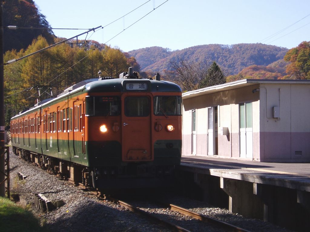 東日本旅客鉄道 大前駅 2006.11.08 投稿者が撮影 もっといい画像が出るまでの暫定画像です。